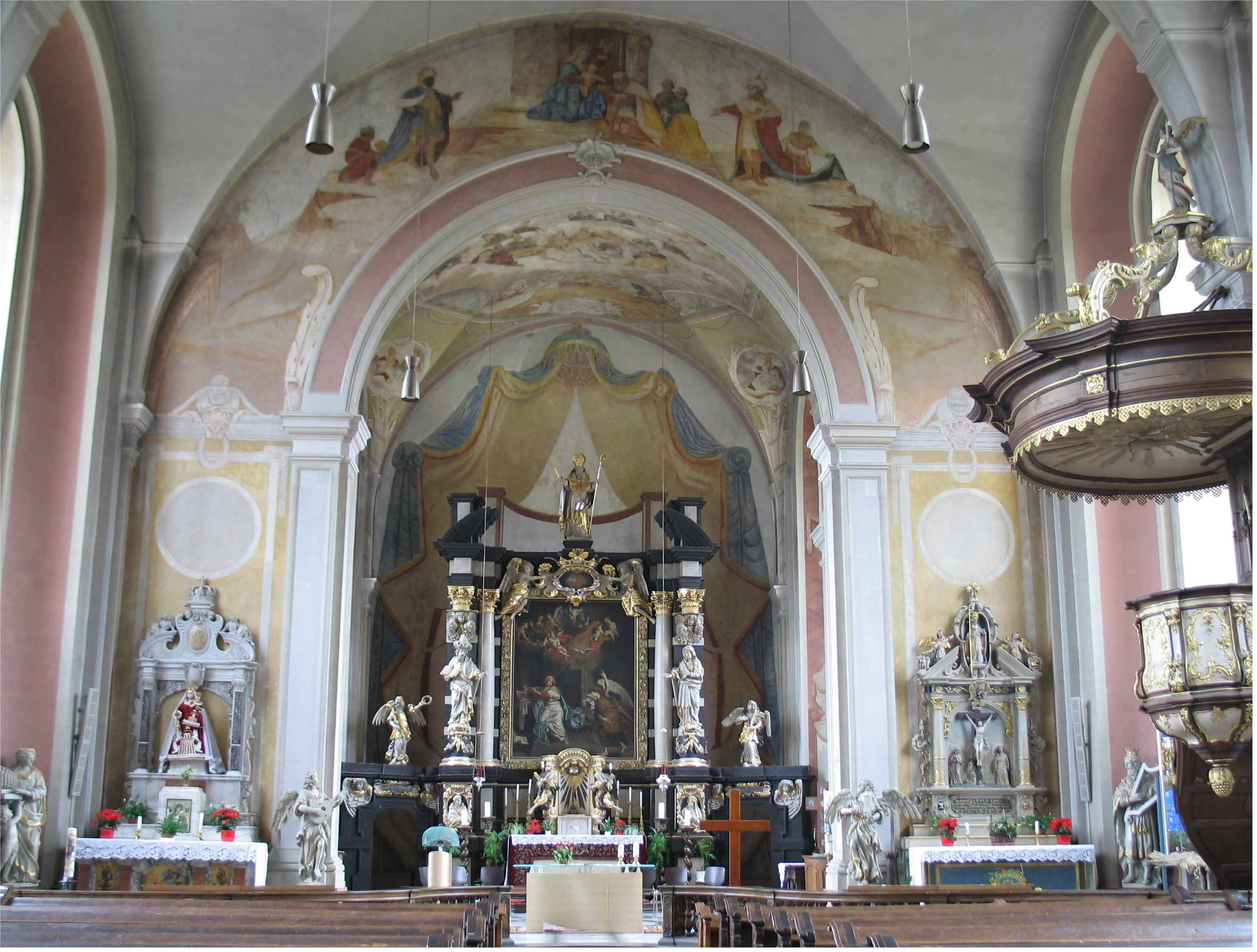 Altär an der Kierch Jonglënster Jonglenster Kategorie:Gemeng Jonglënster